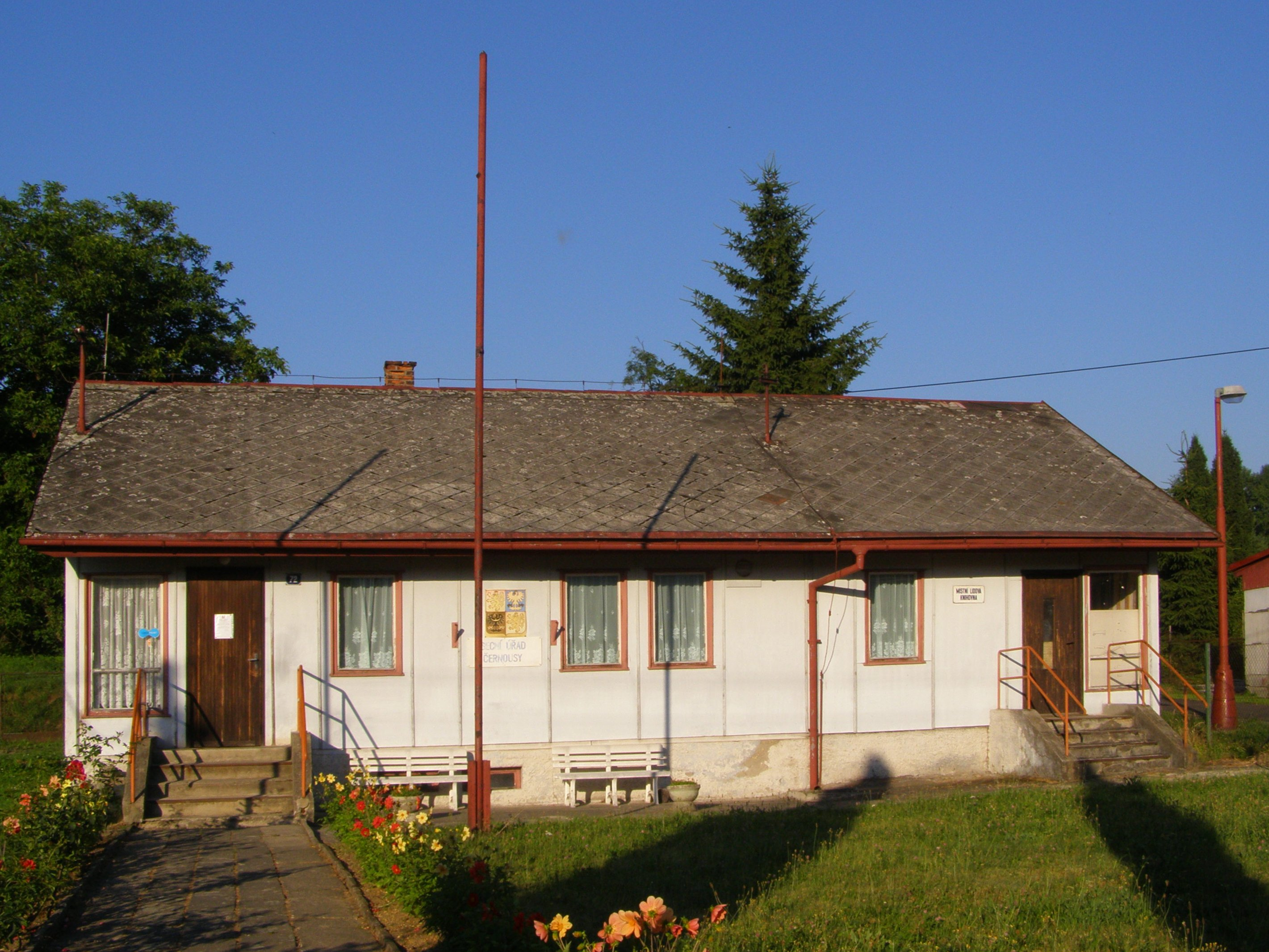 Česky: Černousy, část Černousy, obecní úřad